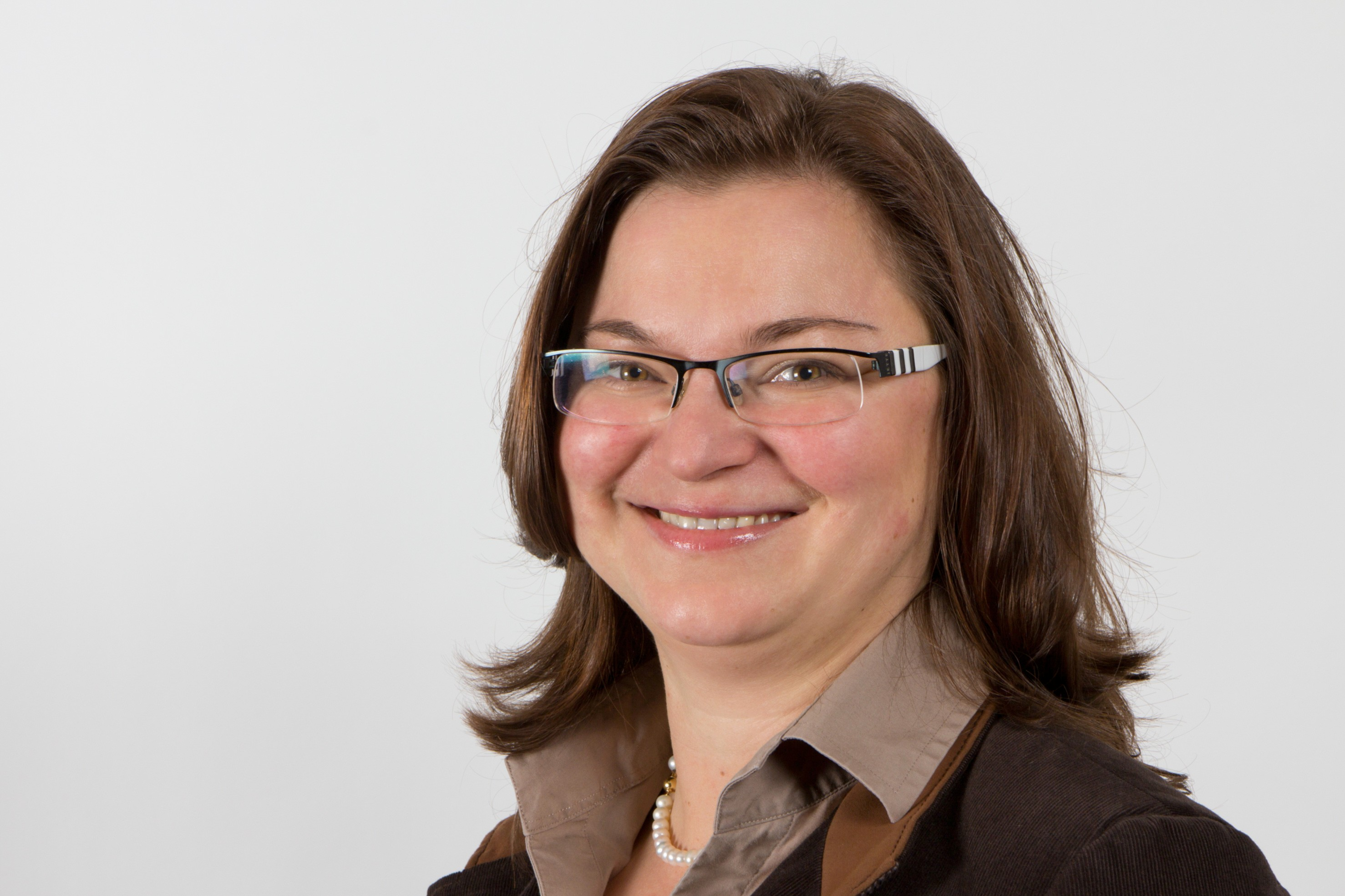 Nadine Hampel (* 15. Februar 1975 in Sangerhausen) ist eine deutsche SPD-Politikerin und seit 2006 Abgeordnete im Landtag von Sachsen-Anhalt. Wikipedia im Landtag – Sachsen-Anhalt 13./14. Dezember 2012 in MagdeburgDieses Foto wurde im Rahmen des Projektes „Wikipedia im Landtag“ erstellt. The making of this document was supported by the Community-Budget of Wikimedia Germany. The making of this work was supported by Wikimedia Austria. For other files made with the support of Wikimedia Austria, please see the category Supported by Wikimedia Österreich. Personality rights warningAlthough this work is freely licensed or in the public domain, the person(s) shown may have rights that legally restrict certain re-uses unless those depicted consent to such uses. In these cases, a model release or other evidence of consent could protect you from infringement claims.